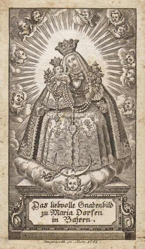 Gnadenbild in Dorfen, Bayern